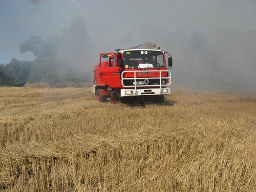 Unidad BX-2